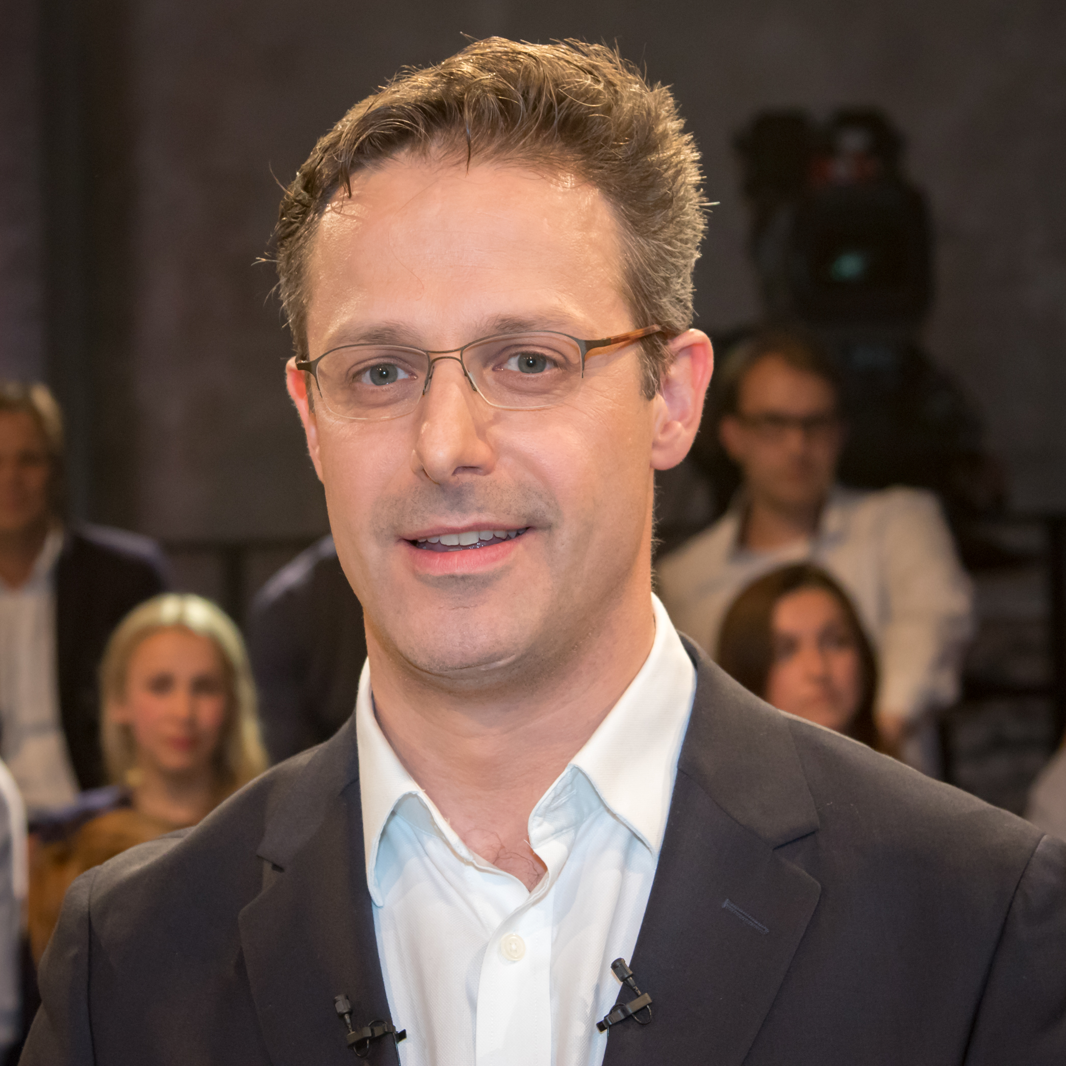 WDR-Sendung Wahl-Arena, Donnerstag, 4. Mai 2017 zur NRW-Wahl: Marcus Pretzell